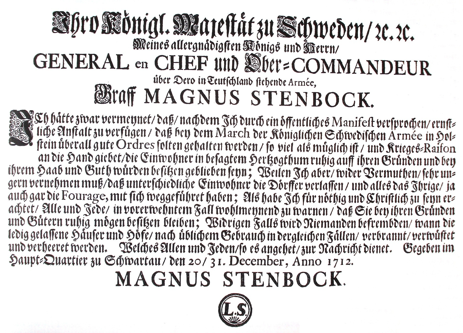 Bad-Schwartau_-_Ankündigung v.Stenbock_1712